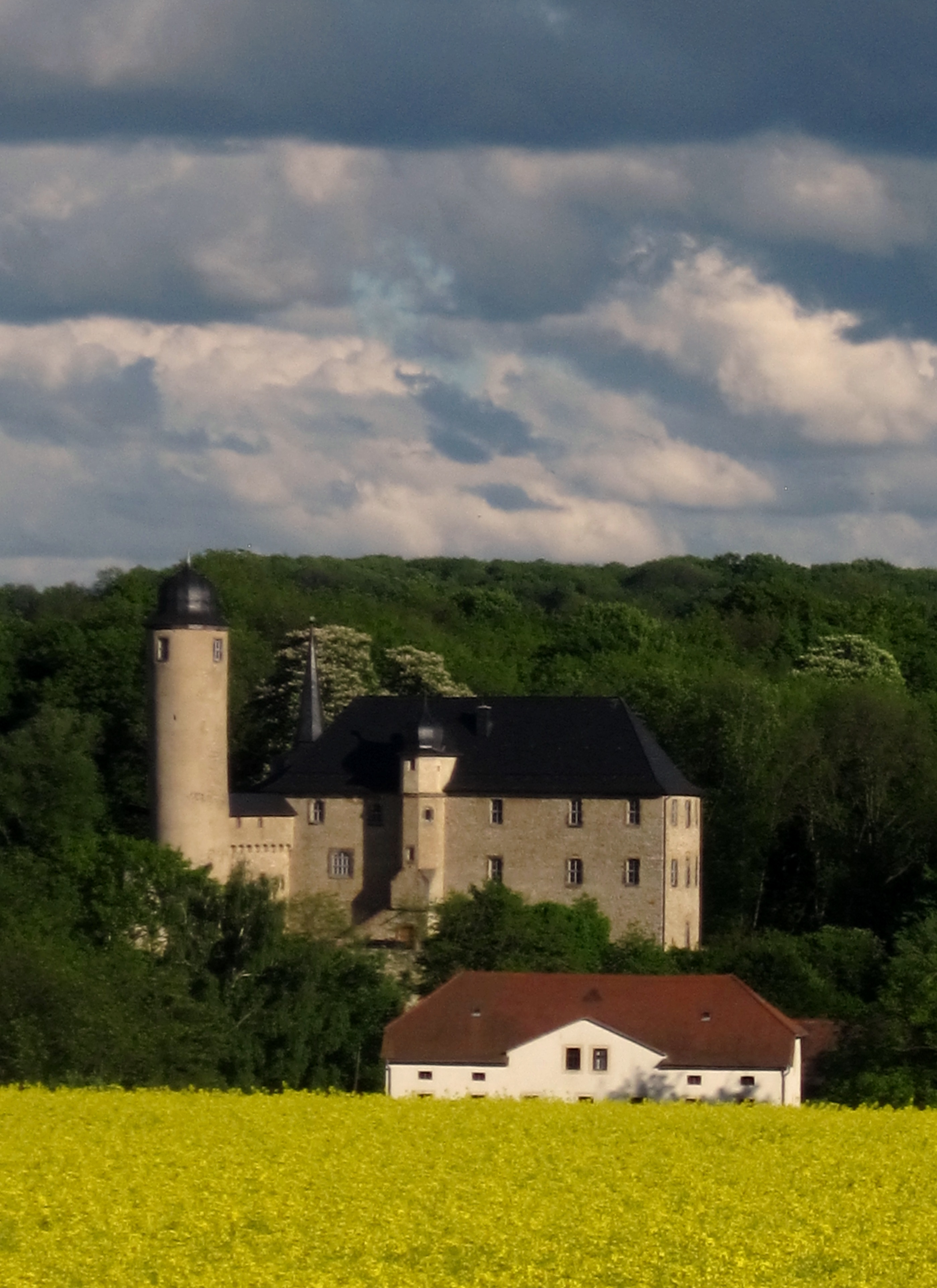 ursprüngl. Wasserburg, Bergfried vor 1400, 1530 Um-und Ausbau, 1699 Um-und Erweiterungsbauten, 1800 sog, "Neues Schloß" errichtet